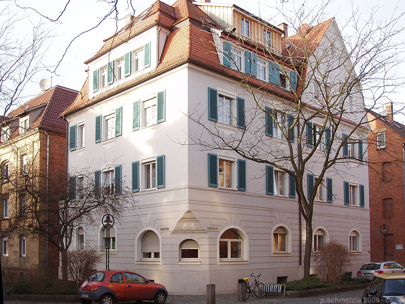 Denkmalgeschütztes Wohnhaus in der Werderstraße 157 in Heilbronn